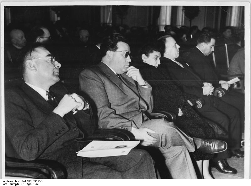 Zentralbild Kümpfel 1.4.1950 Der neue Weg Ungarns. In Anwesenheit von Staatspräsident Pieck, Ministerpräsident Grotewohl und anderen führenden Persönlichkeiten der DDR sowie ausländischer Gäste, wurde am 1.4.1950 die Ausstellung "Der neue Weg Ungarns" im Haus der DDR eröffnet. UBz.: Ausländische Gäste (v.l.n.r.) Fürnberg (Tschechoslowakei), der rumänische Gesandte Balanesen, seine Gattin, der Polnische Botschafter Izydorczik und Istvan Antos (Ungarn). "